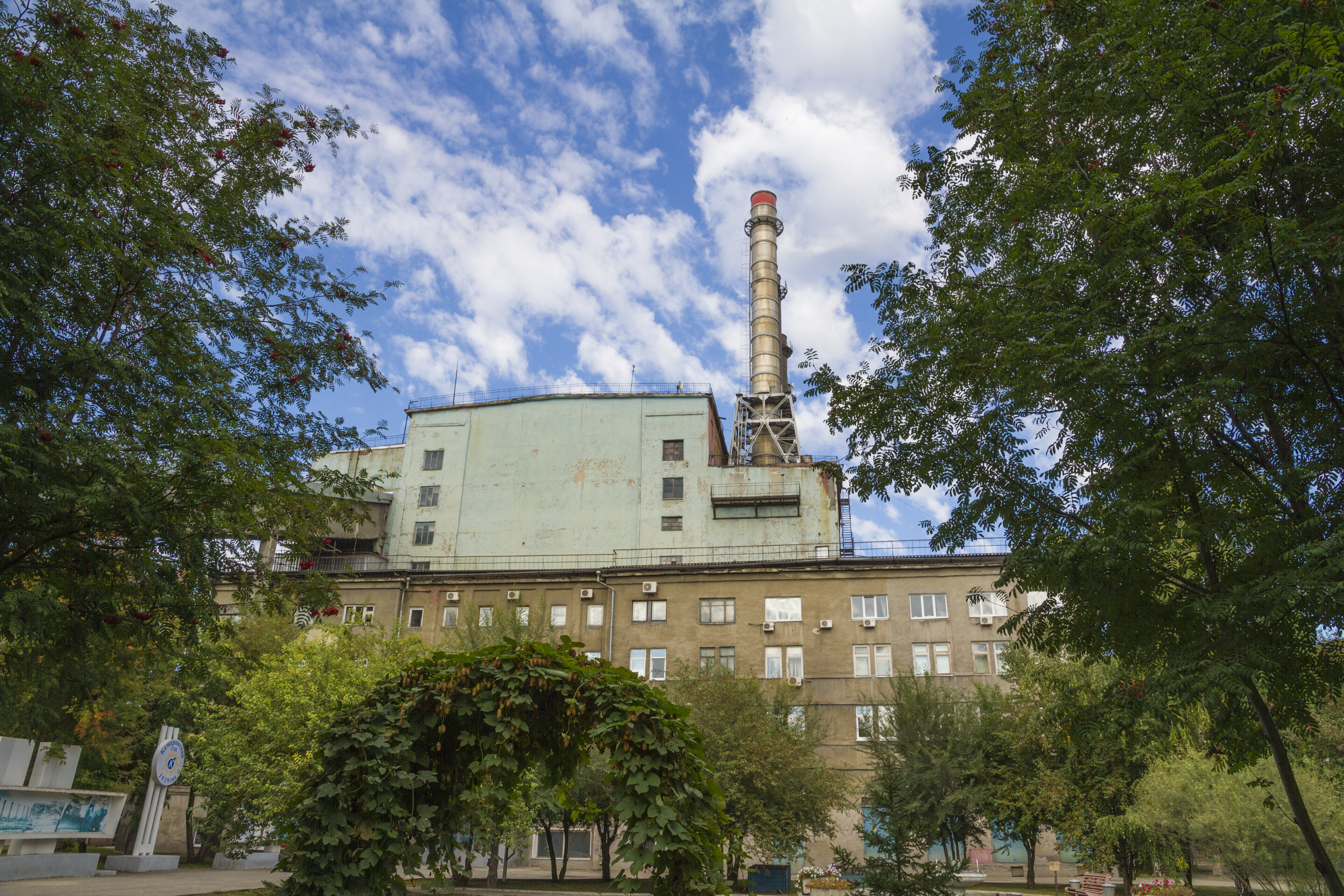 Внешний вид Кемеровской ТЭЦ